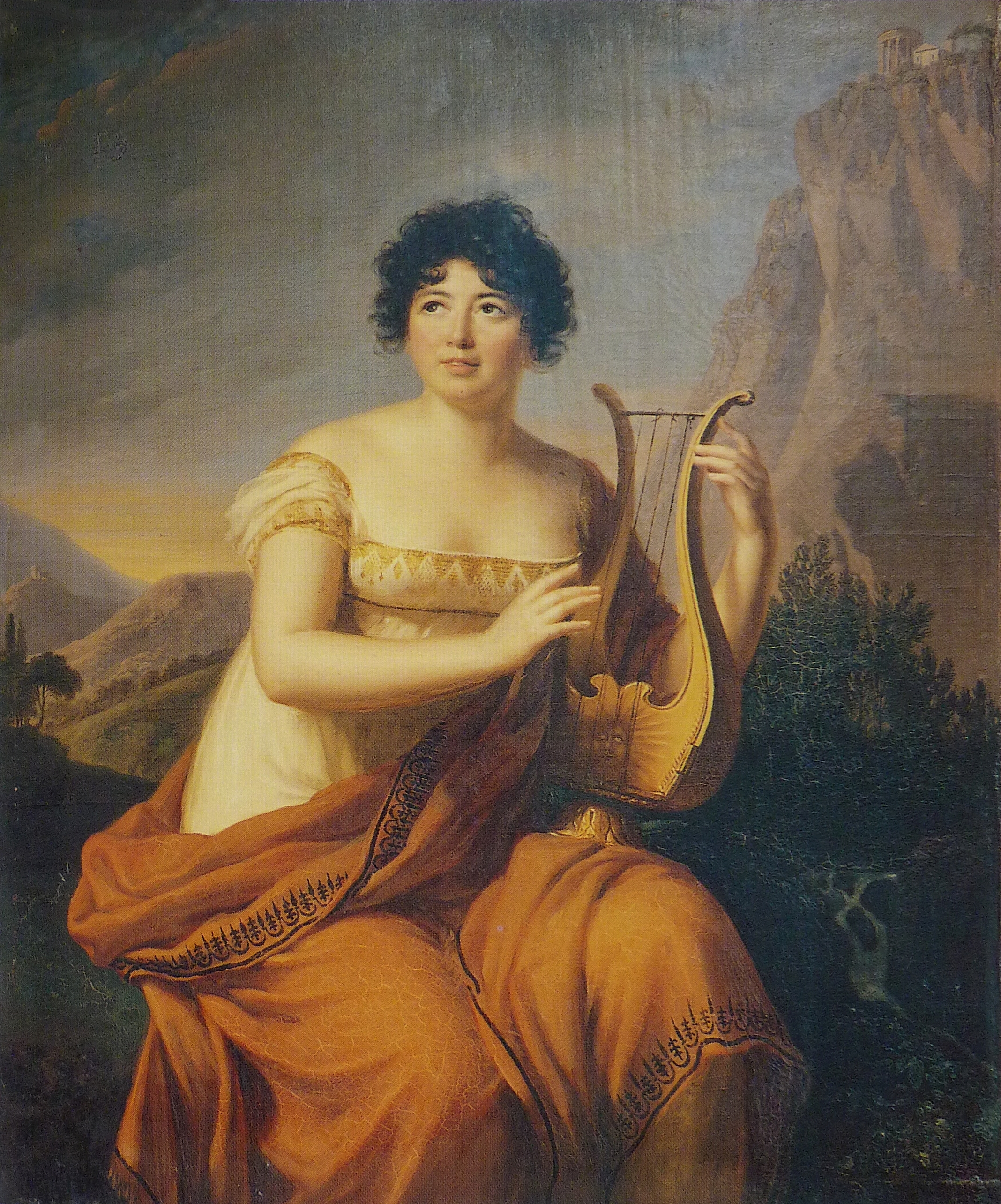 Publié dans Histoire de la littérature en Suisse romande, tome I, éditions Payot-Lausanne.